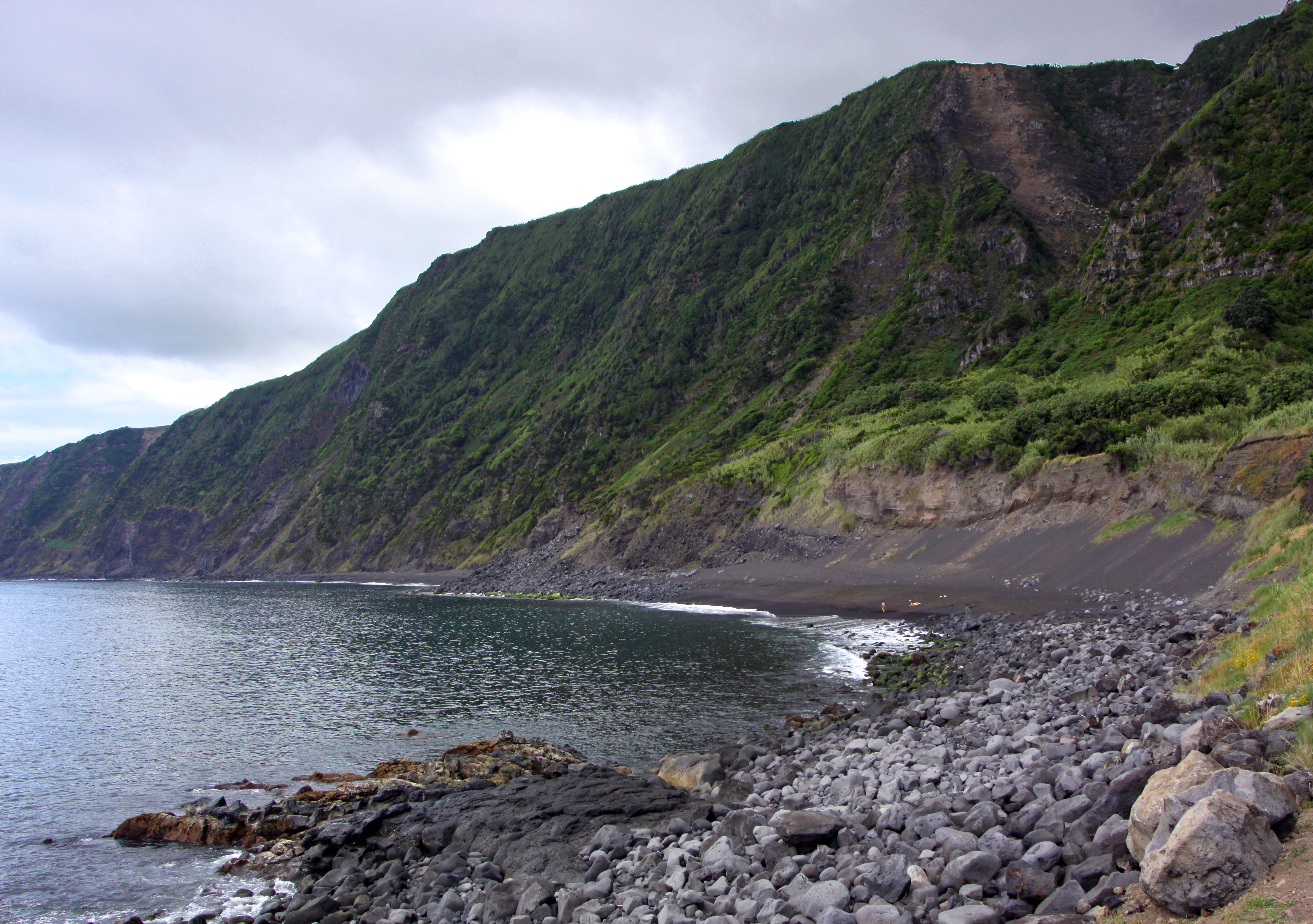 Ilha do Faial, Açores. La Baía da Ribeira das Cabras.